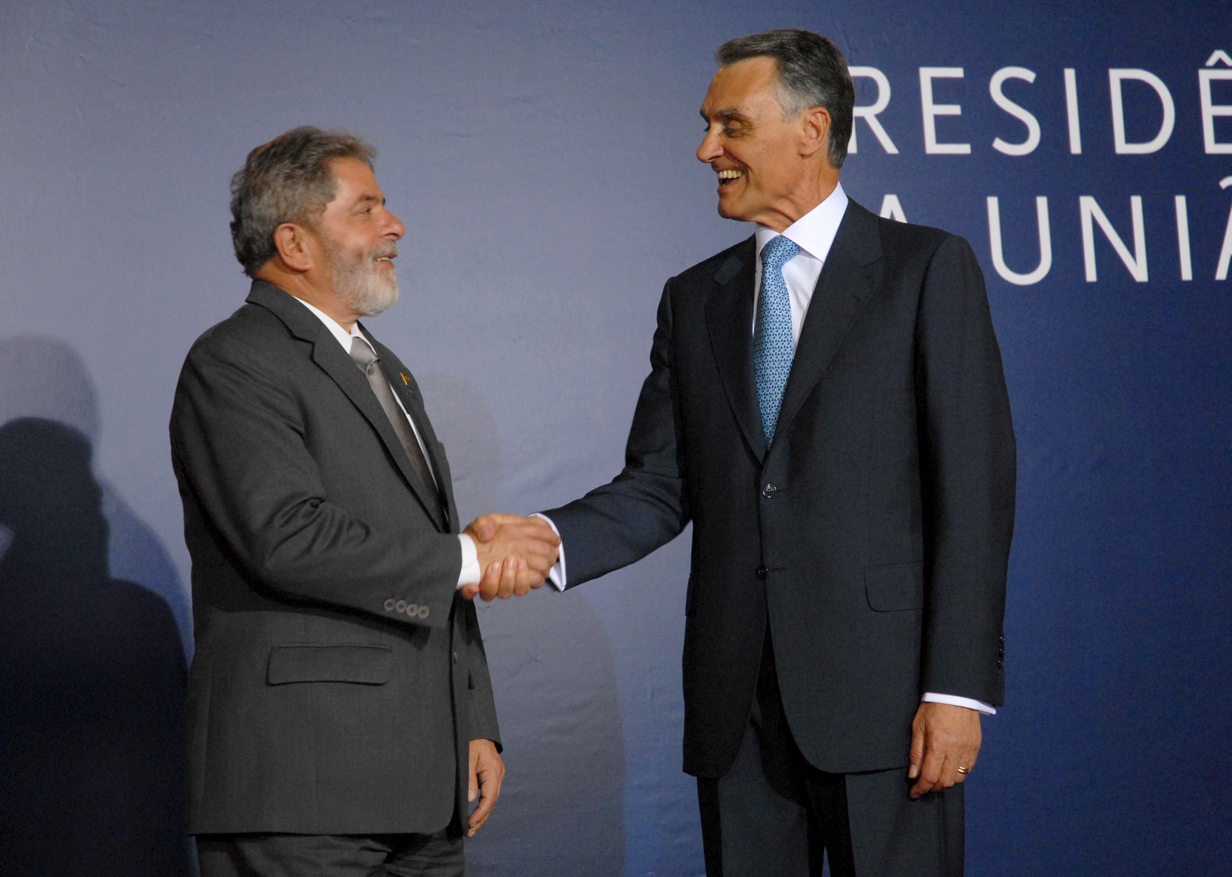 Os presidentes de Brasil e Portugal, Luís Inácio Lula da Silva e Aníbal Cavaco Silva.